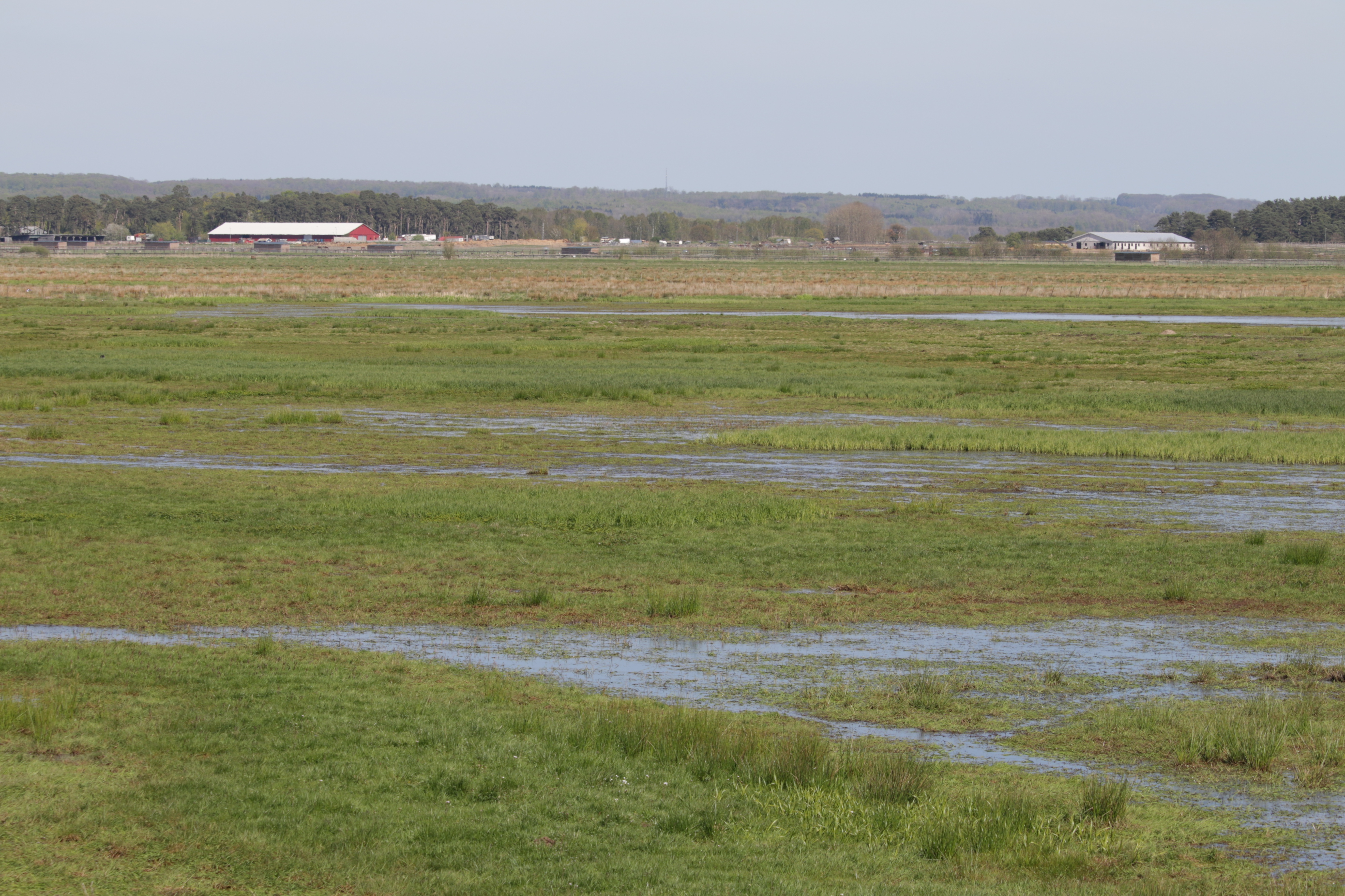 Klingavälsåns dalgång